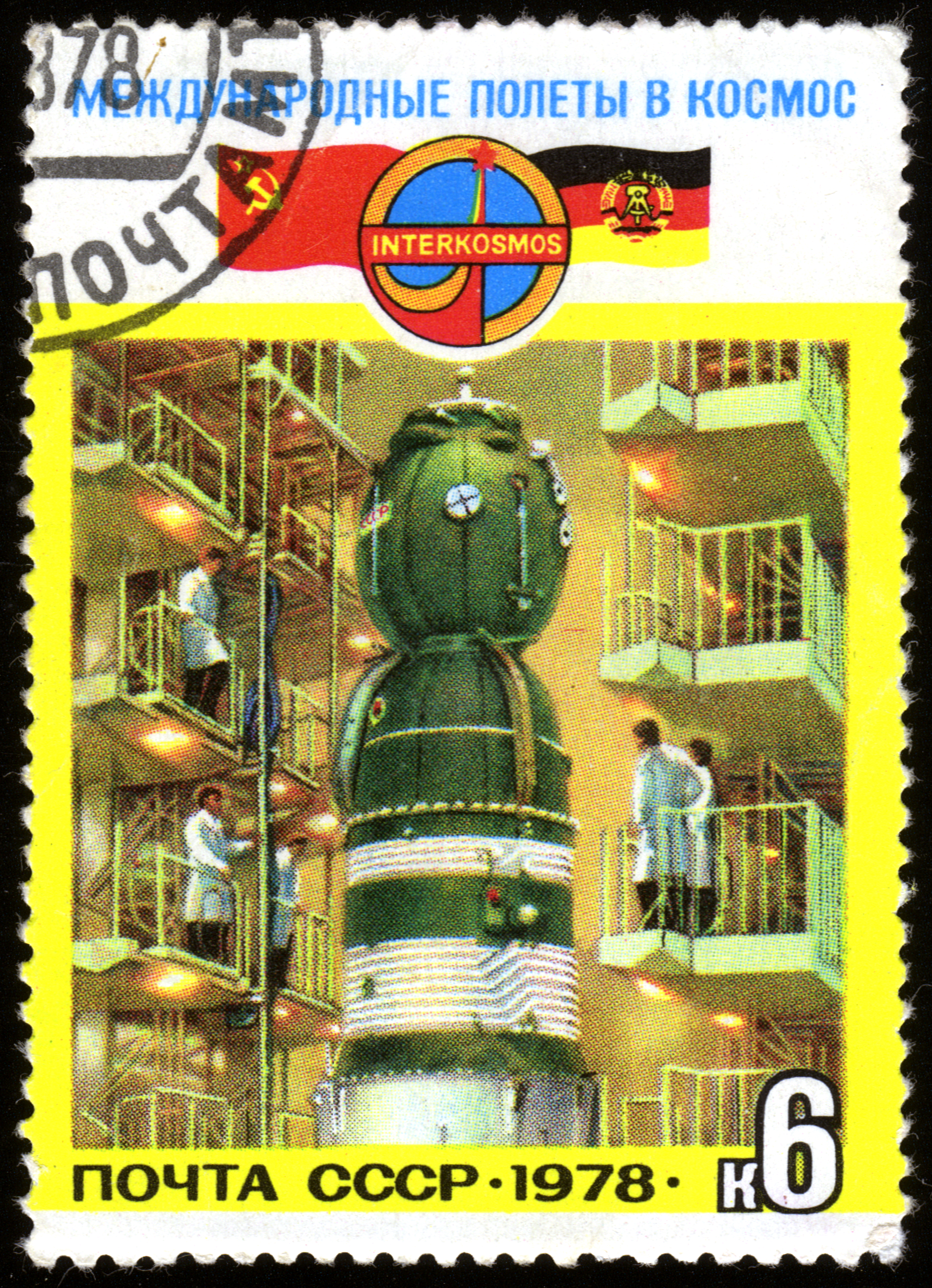 Марка Почты СССР, выпущенная в честь полета третьего международного космического экипажа (СССР - ГДР). 1978 год. На марке изображён космический корабль «Союз» в цехе сборки. Художник — Г. Комлев. Номер — 4880 (ЦФА). Тираж — 6,8 млн экз.